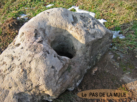 Rocher du Pas de la Mule à Braize Photo prise par Jean-Jacques Martin